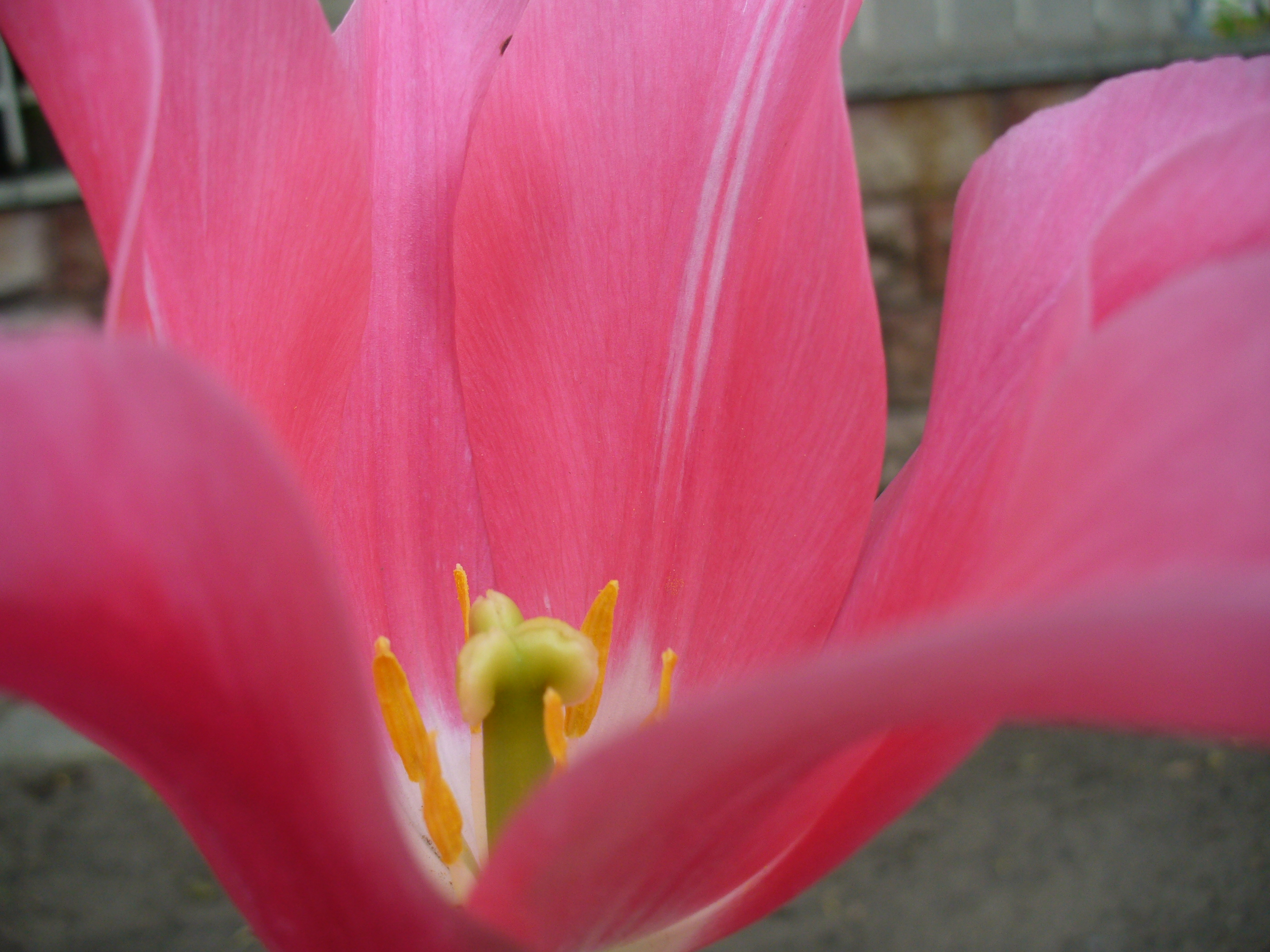 A tulipán ivarlevelei